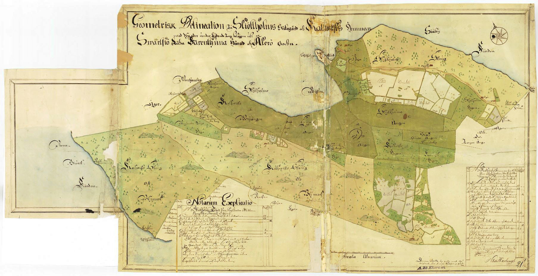 Skytteholms sätesgårds ägor